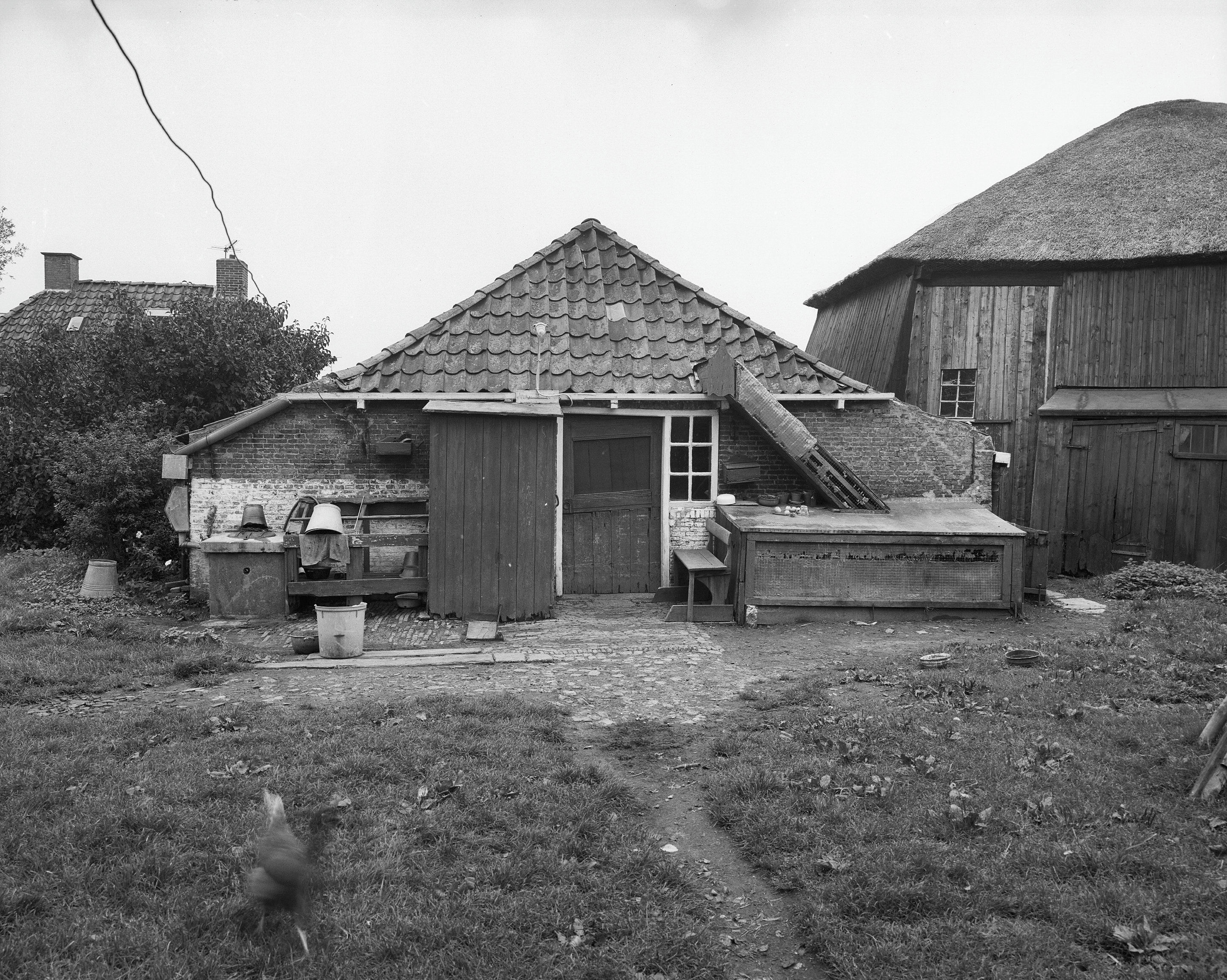 achterzijde